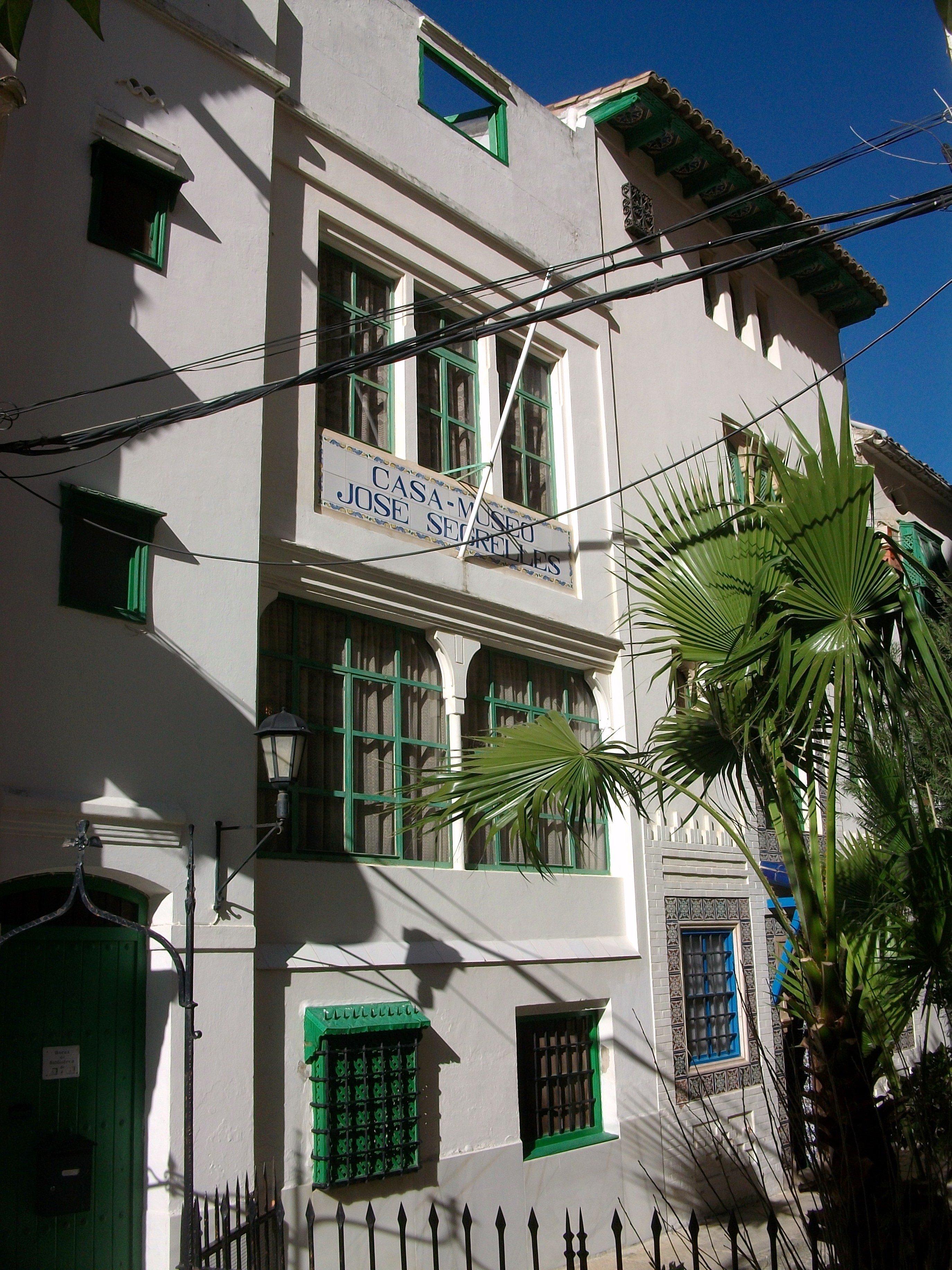 Casa-Museu Josep Segrelles, Albaida.